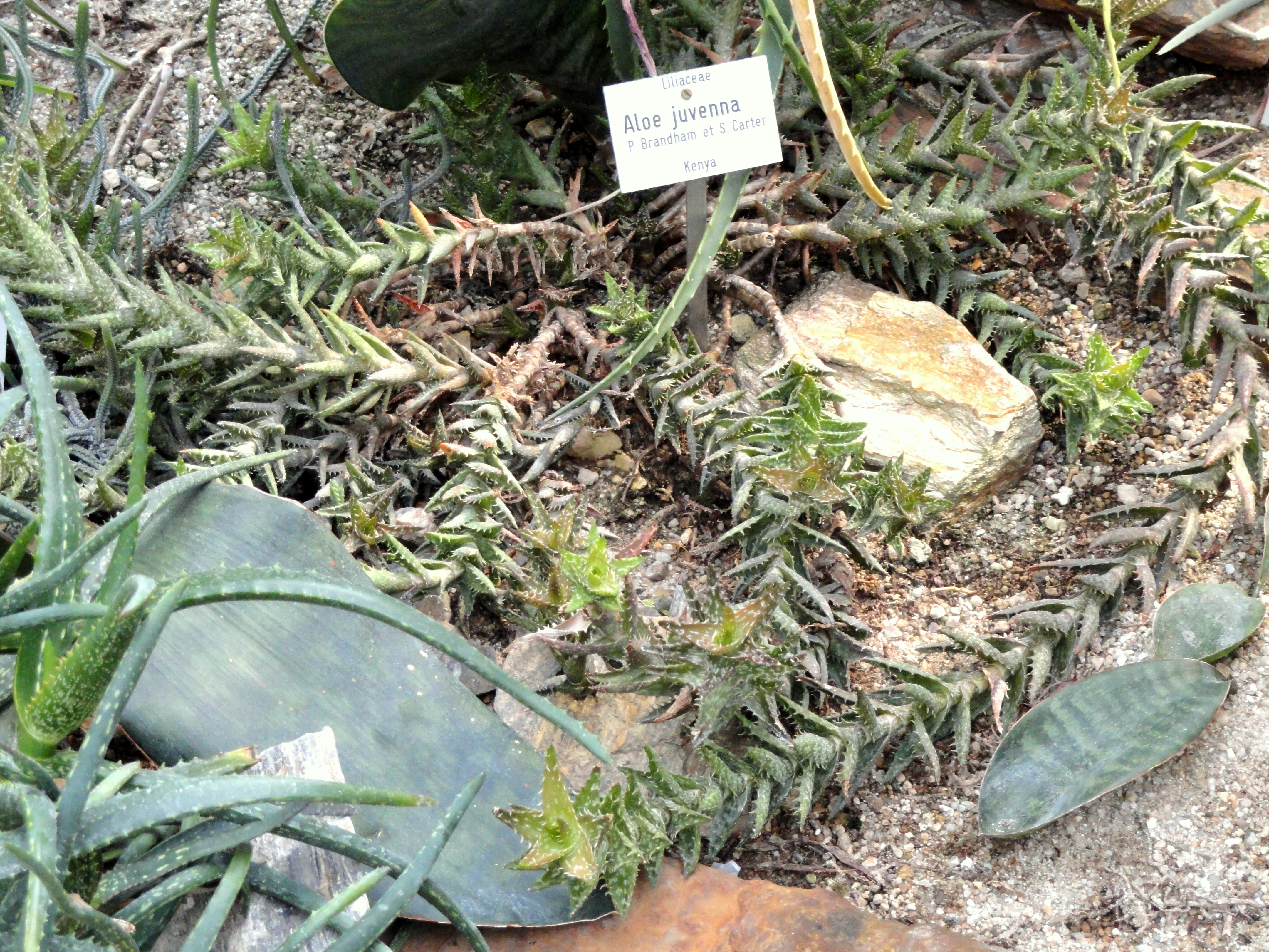 Aloe juvenna specimen in the Botanischer Garten München-Nymphenburg, Munich, Germany.